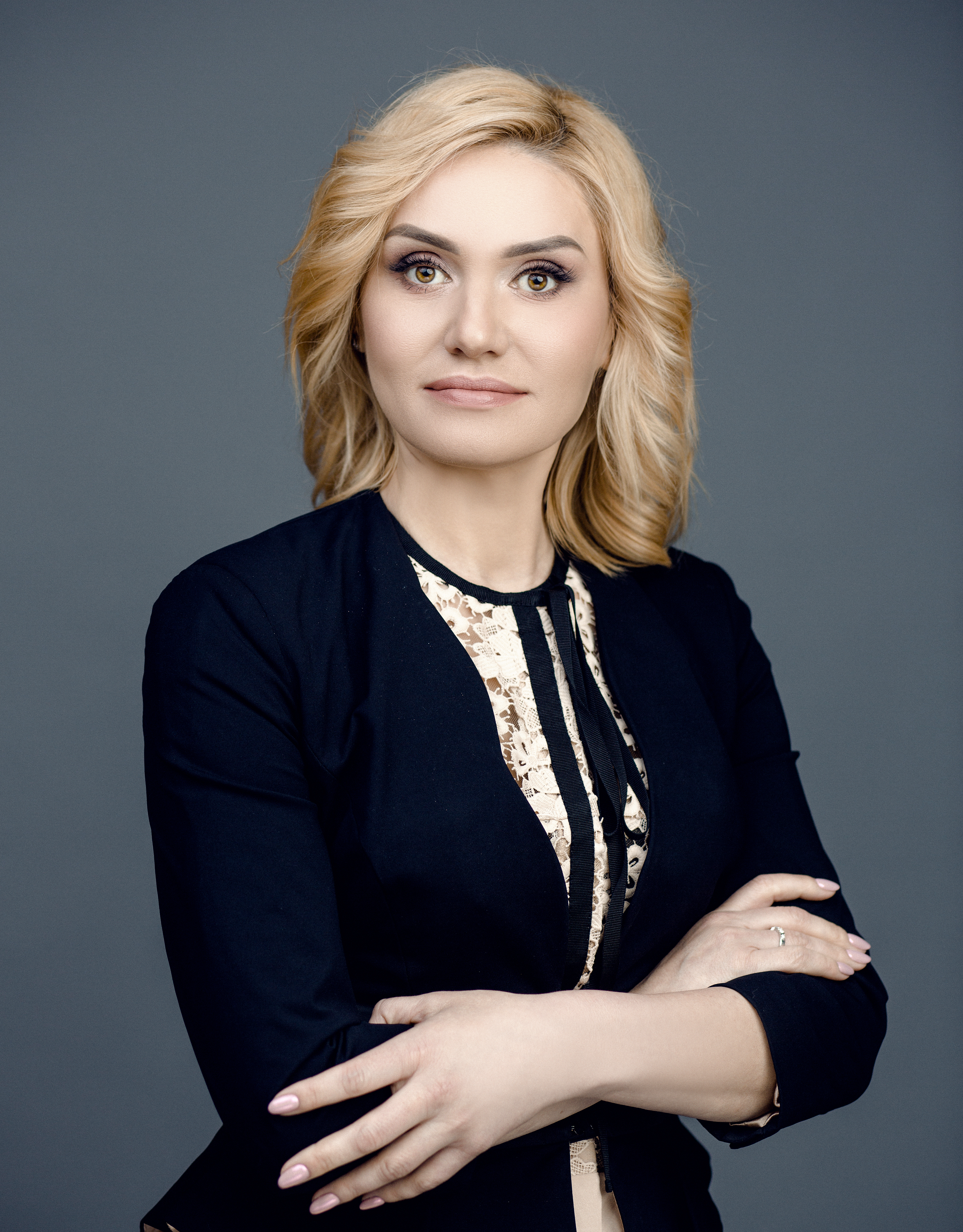 Тетяна Острікова